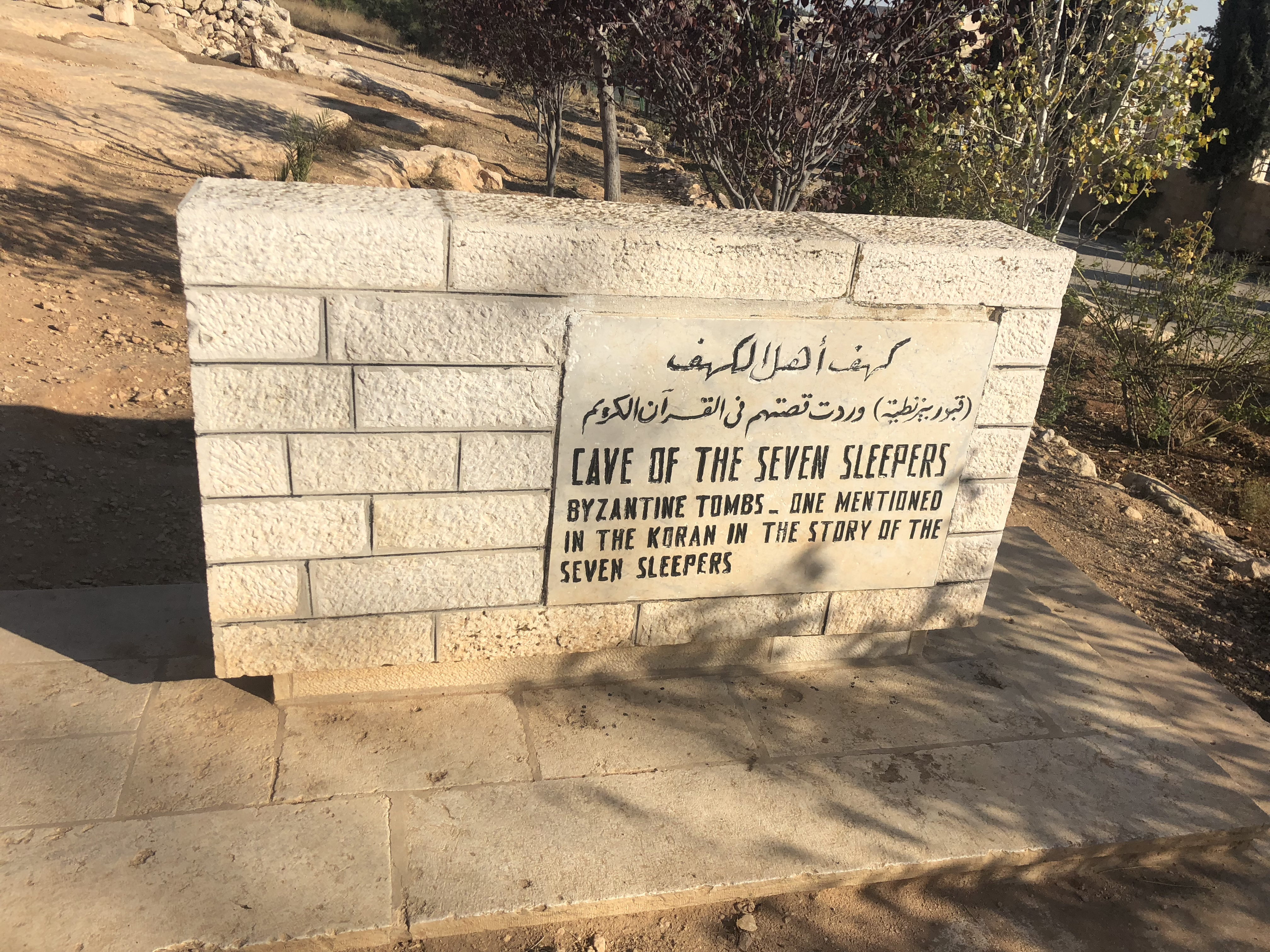 (لوحة كتب عليها بالعربية والإنجليزية عبارة :كهف أهل الكهف (قبور بيزنطية ذكرت أسماءهم في القرآن الكريم